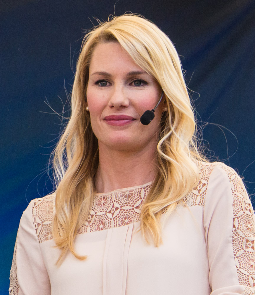 Sportreporter Hanna Marklund inför att Sveriges U21-landslag blir firad i Kungsträdgården i Stockholm den 1 juli av 1000-tals fans efter guldet i U21-Europamästerskapet i fotboll 2015.